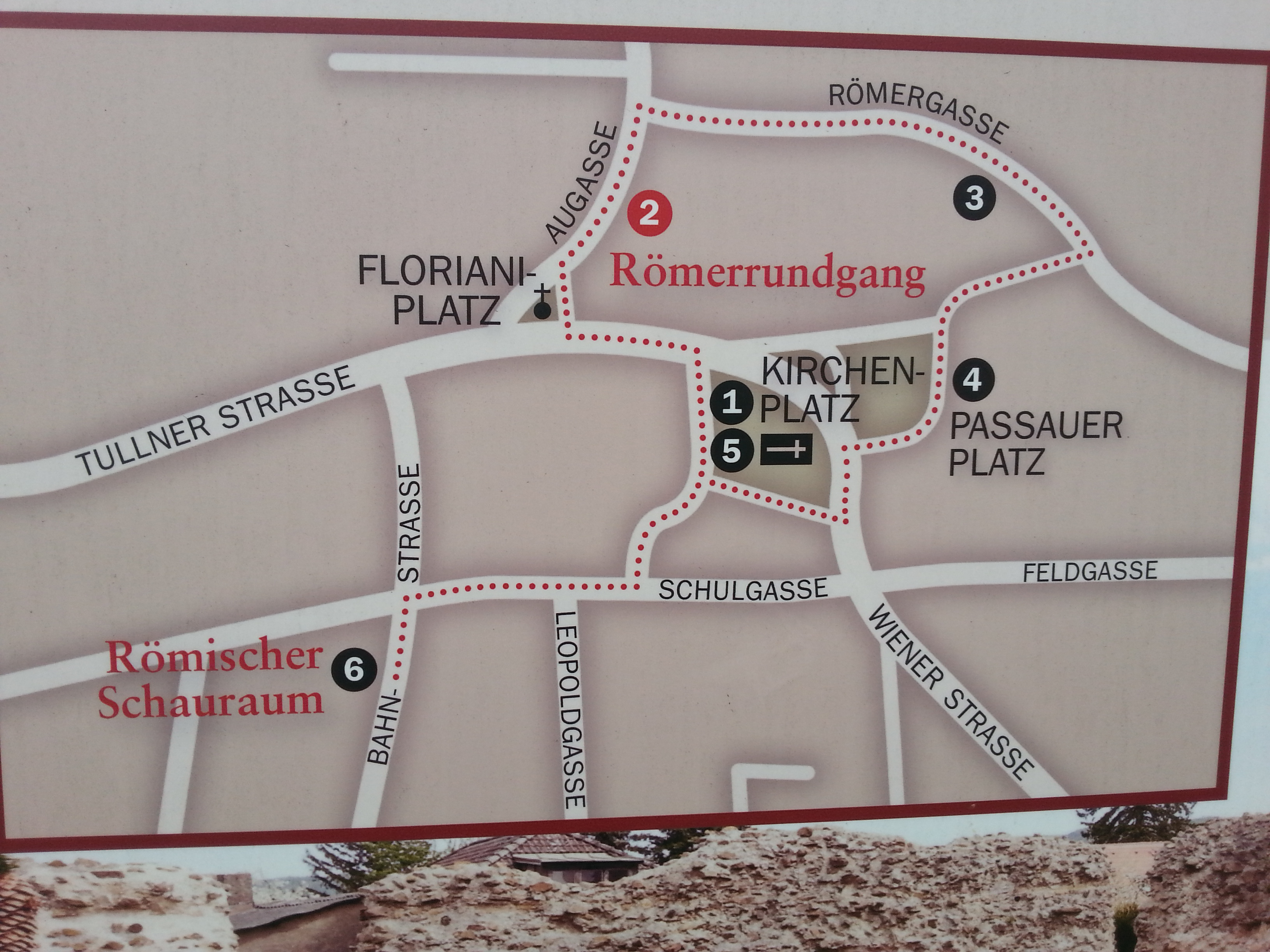 Orientierungsplan Römerrundgang Zeiselmauer (Niederösterreich).